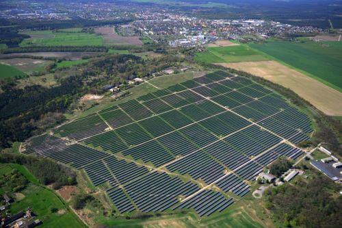 FÜRSTENWALDE 04.05.2013 Solarpark / Solarkraftwerk / Photovoltaikanlage auf dem ehemaligen Flugplatz Fürstenwalde im Bundesland Brandenburg. Das Solarkraftwerk wurde vom Photovoltaik-Unternehmen Solarhybrid AG errichtet. // Solar power station in the former airfield of Fürstenwalde.